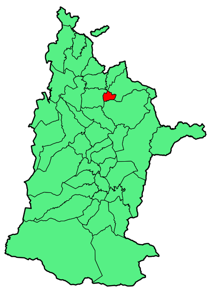 Aipaturiko udalerriaren kokapena Zuberoan